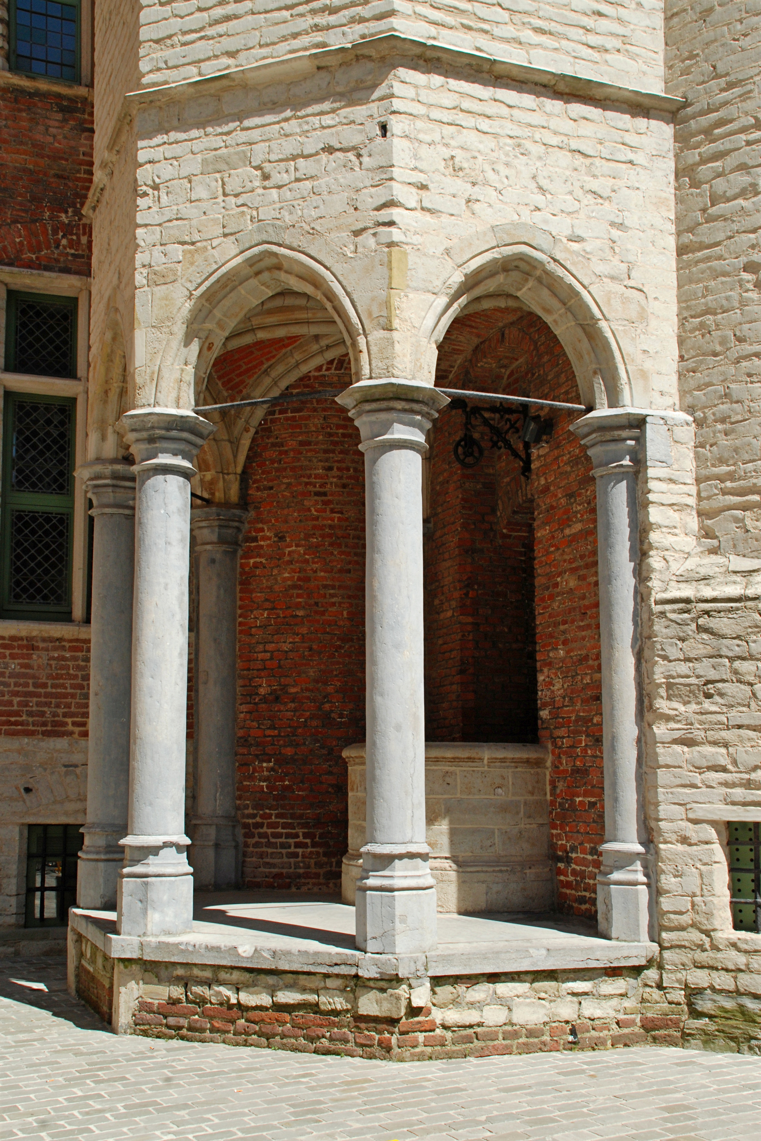 Belgique - Gand - Maison de l'Arrière-Faucille (14e-15e-16e siècles)